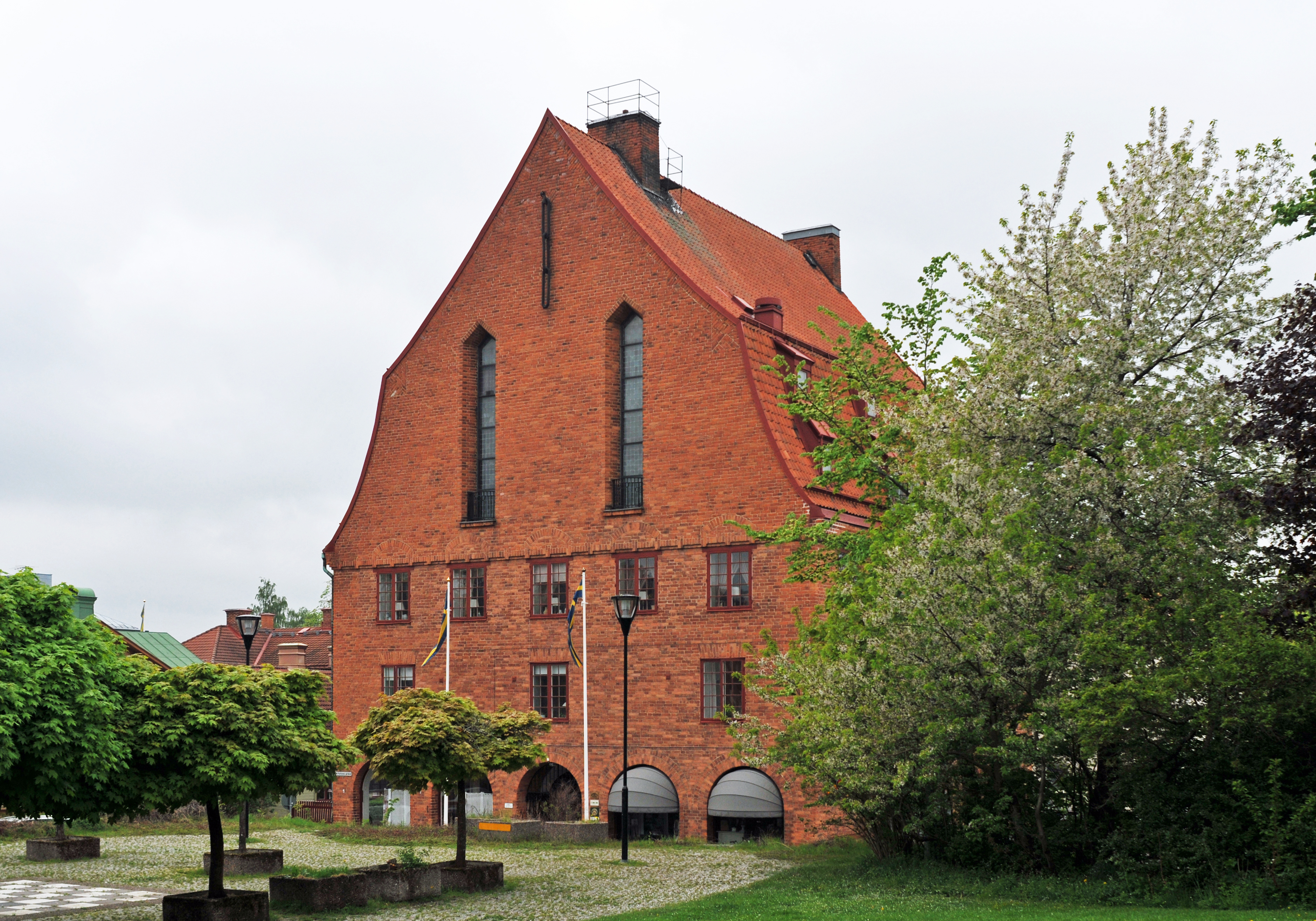 Odd Fellow-huset i Nyköping. Ordenshus byggt 1913.